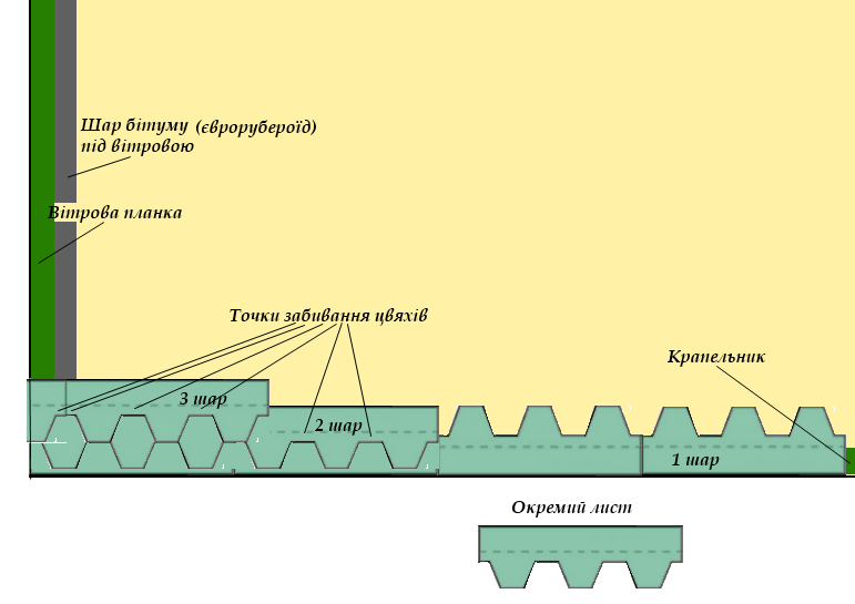 Бітумна Черепиця Порядок Монтажу 3